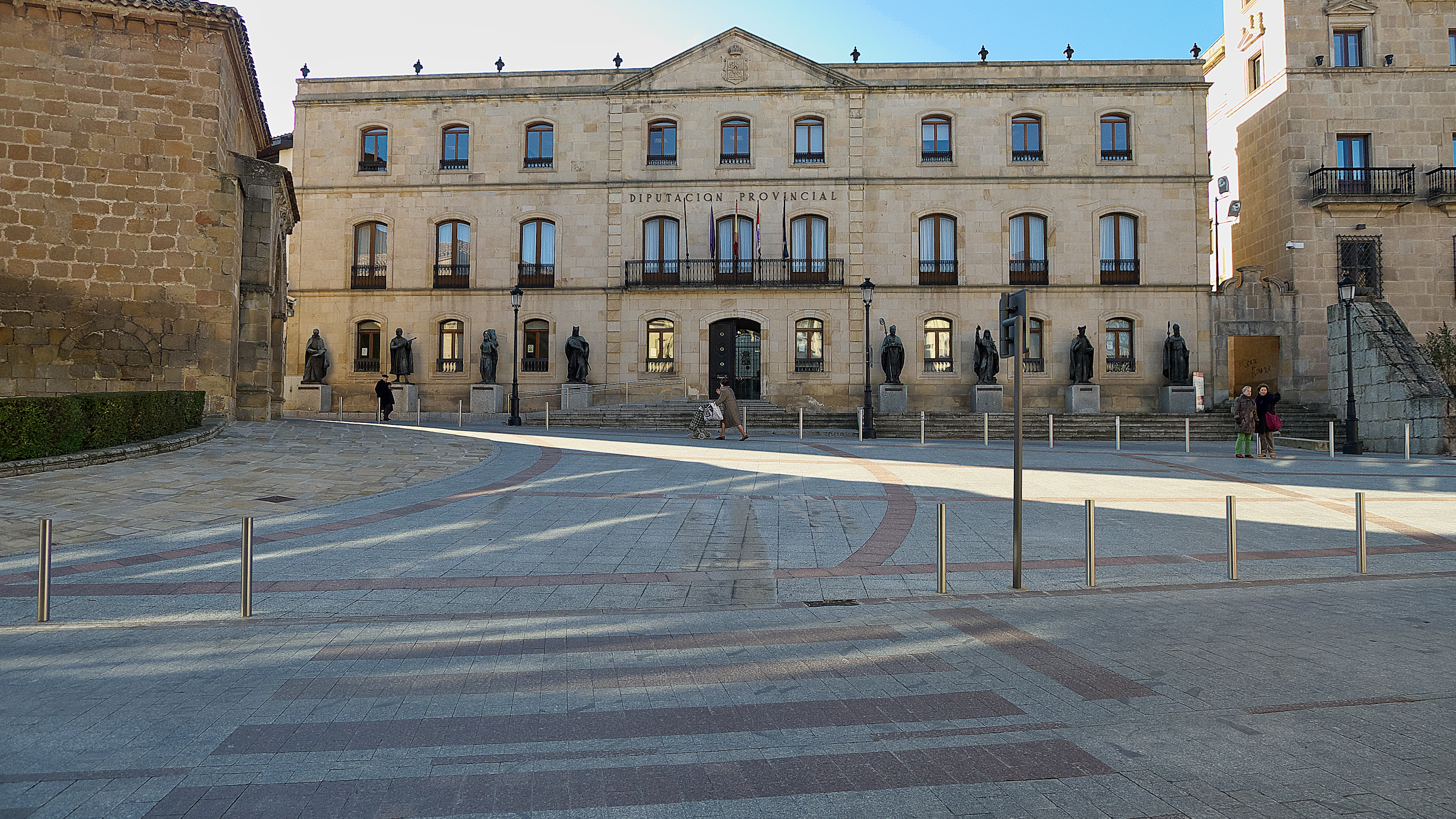 Antigua casa-palacio de los Marqueses de Vadillo en la ciudad de Soria, (España). Actualmente es la sede de la Diputación Provincial de Soria.